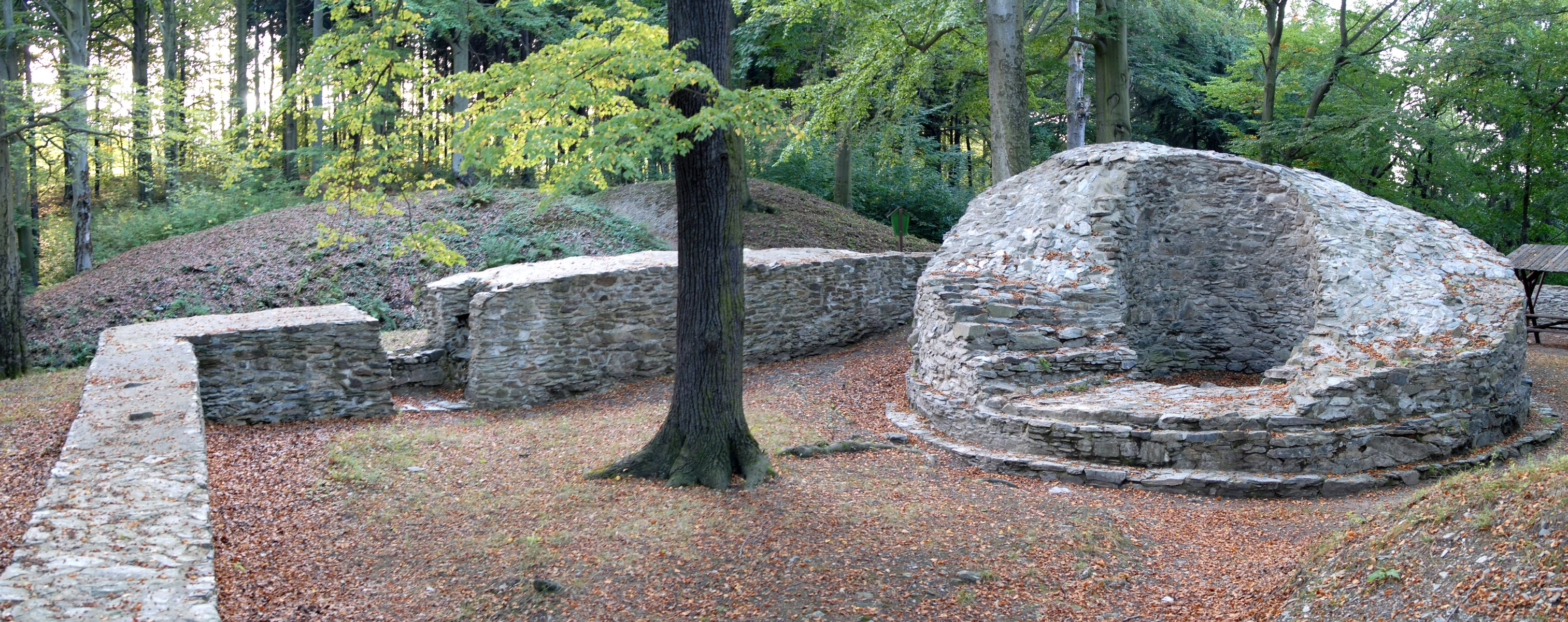 Ruine Isenburg mit Bergfried